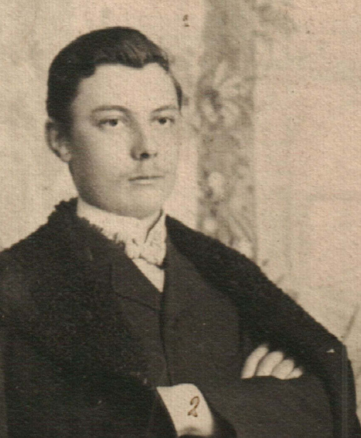 Снимка на Крум Чапрашиков от Дупница